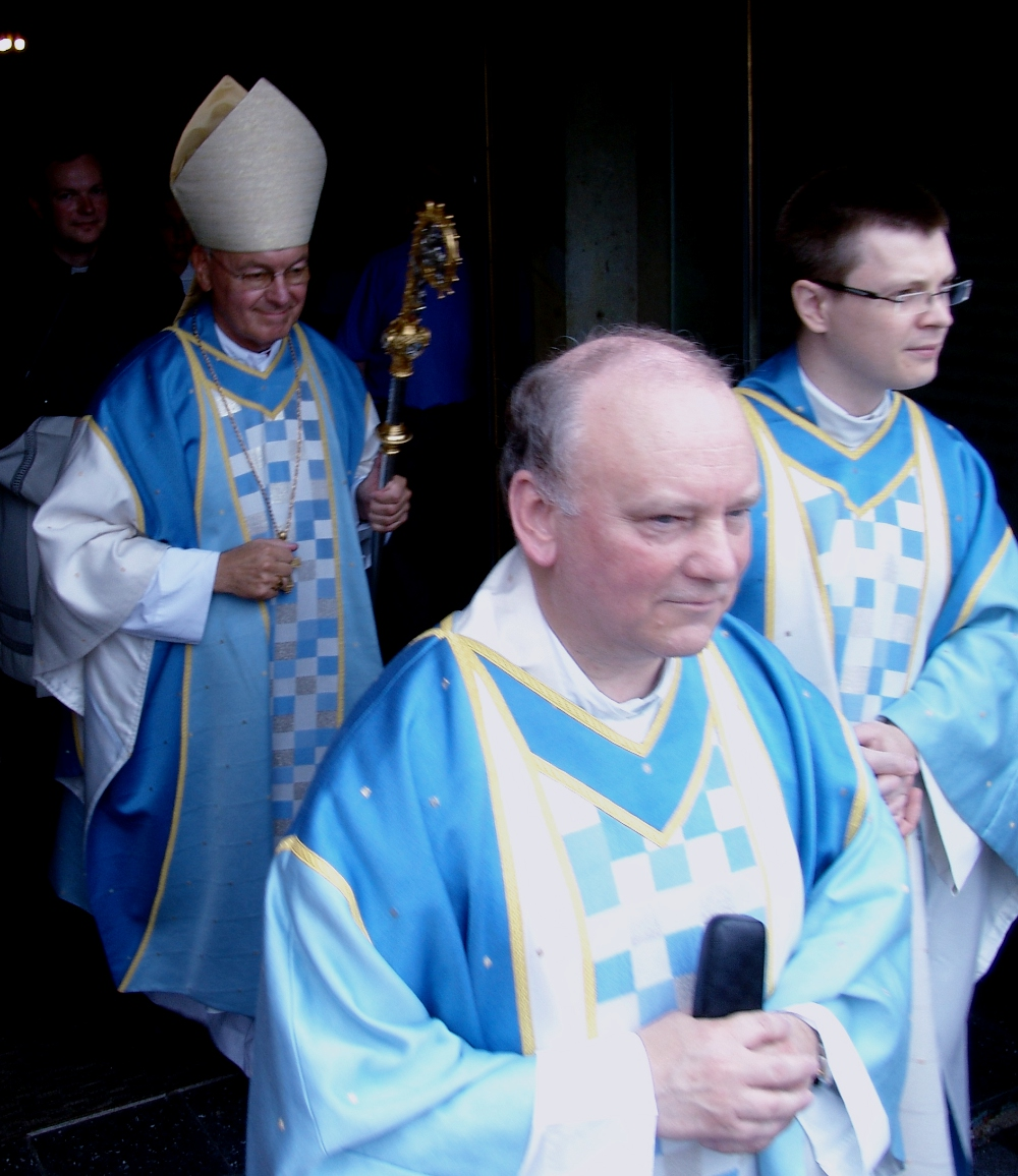 Bischof Heinz Josef Algermissen im Trutzhainer Wallfahtsmessgewand.